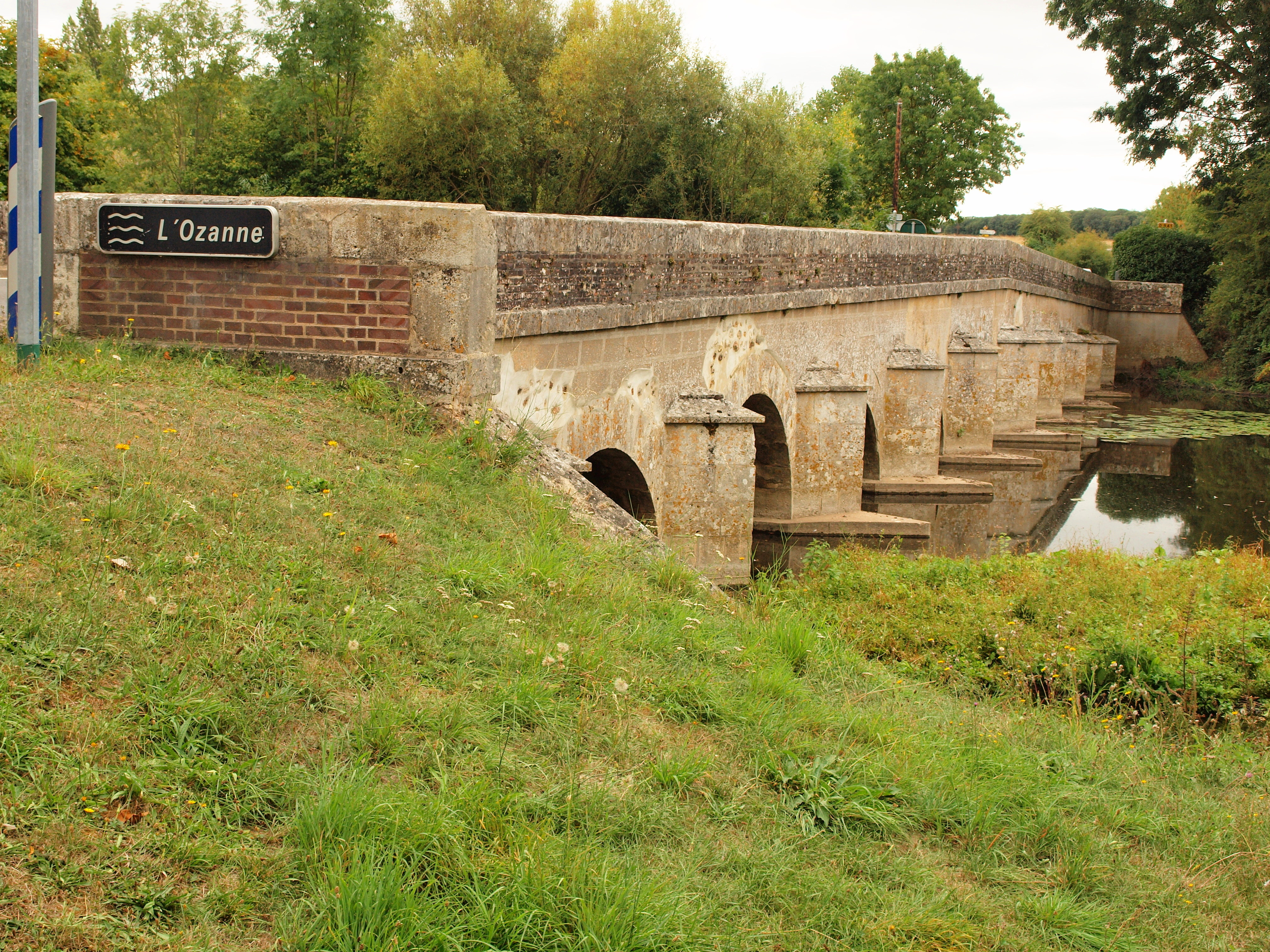 L'Ozanne à Dangeau (Eure-et-Loir, France)